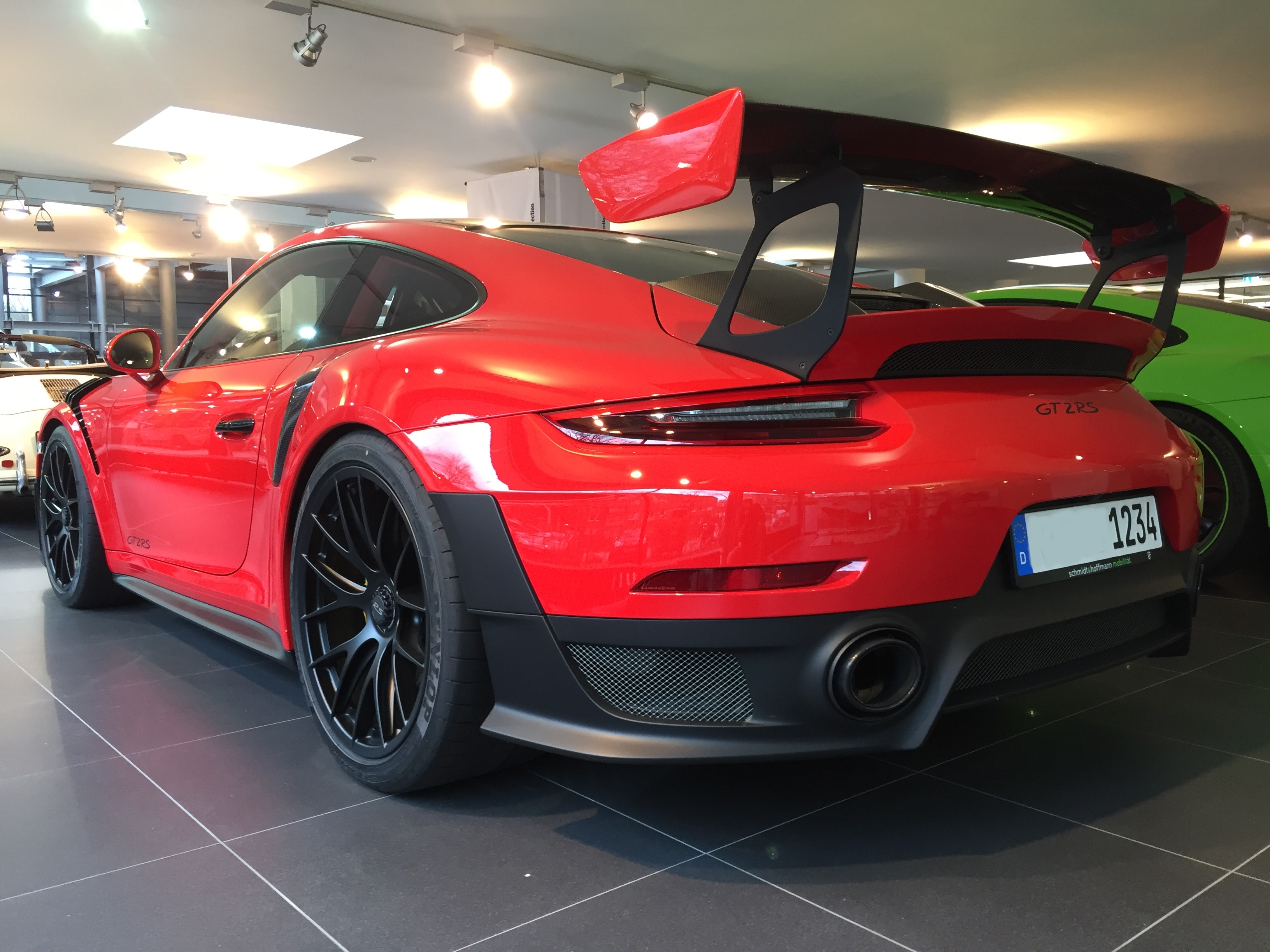 Porsche 991 GT2 RS Heckansicht